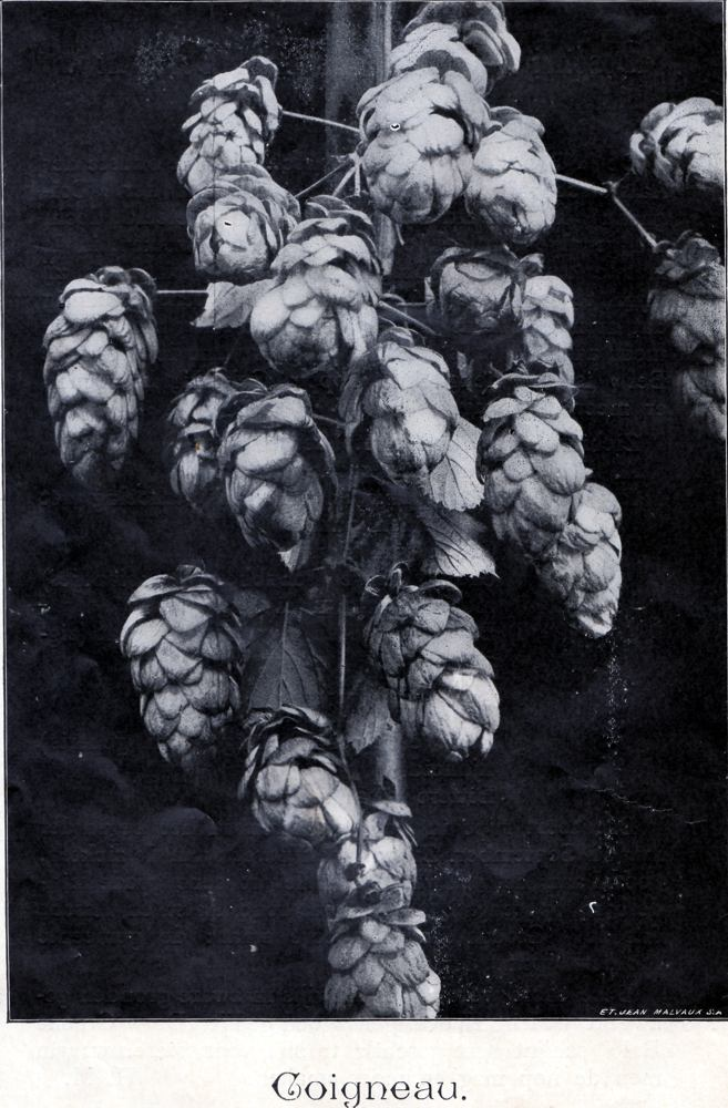 Afbeelding (H.M) van de Coigneaubellen in ‘Voor Betere Hoppen’, A. Suys, Ninove, 1909.